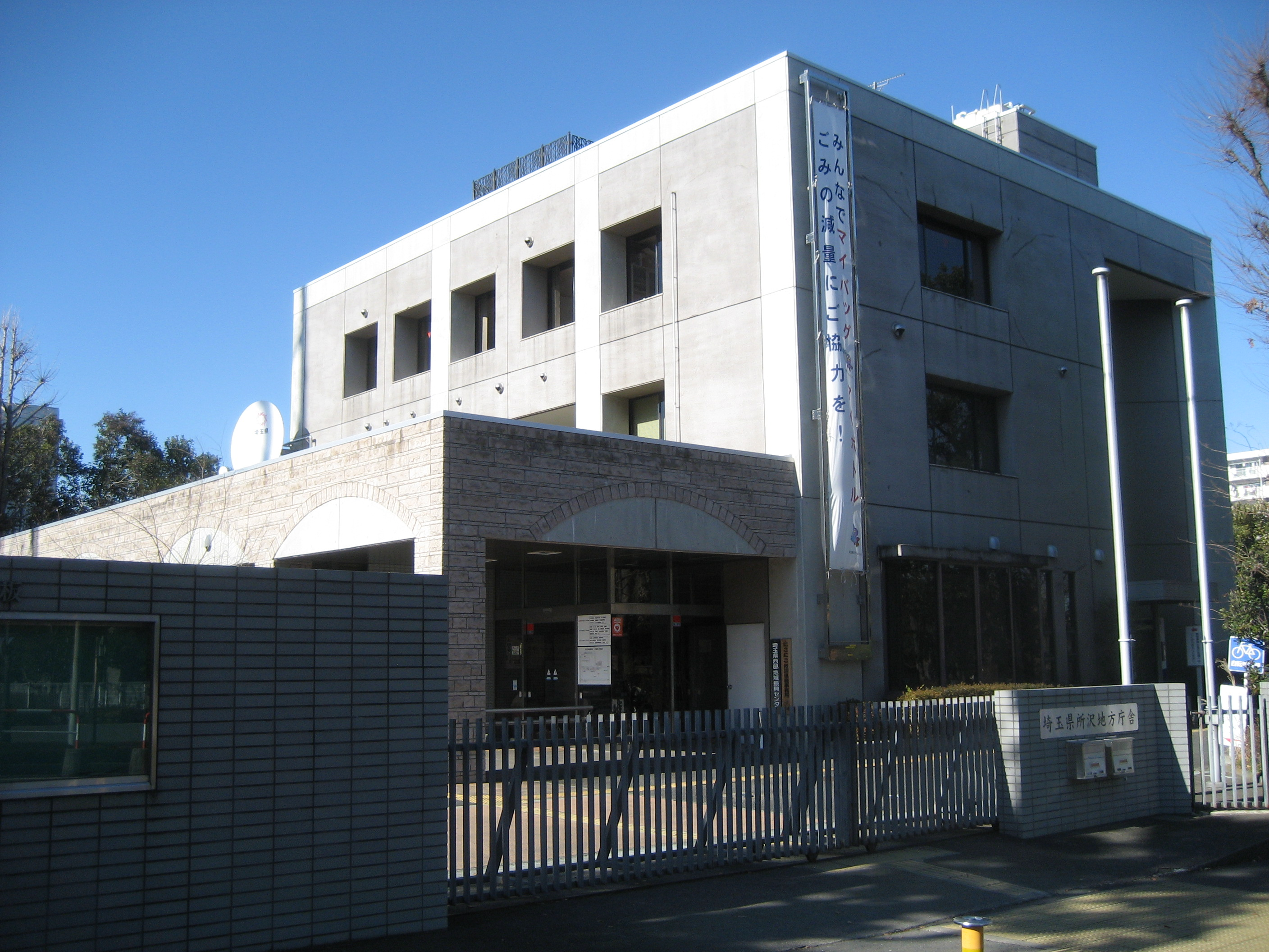 埼玉県所沢市に所在する埼玉県所沢地方庁舎